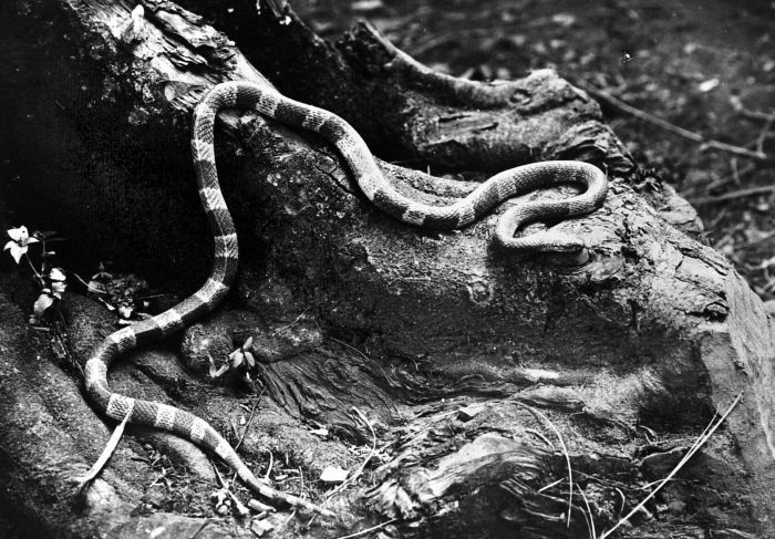 Repronegatief. Giftslang 'Oelar welang' Bungarus candidus